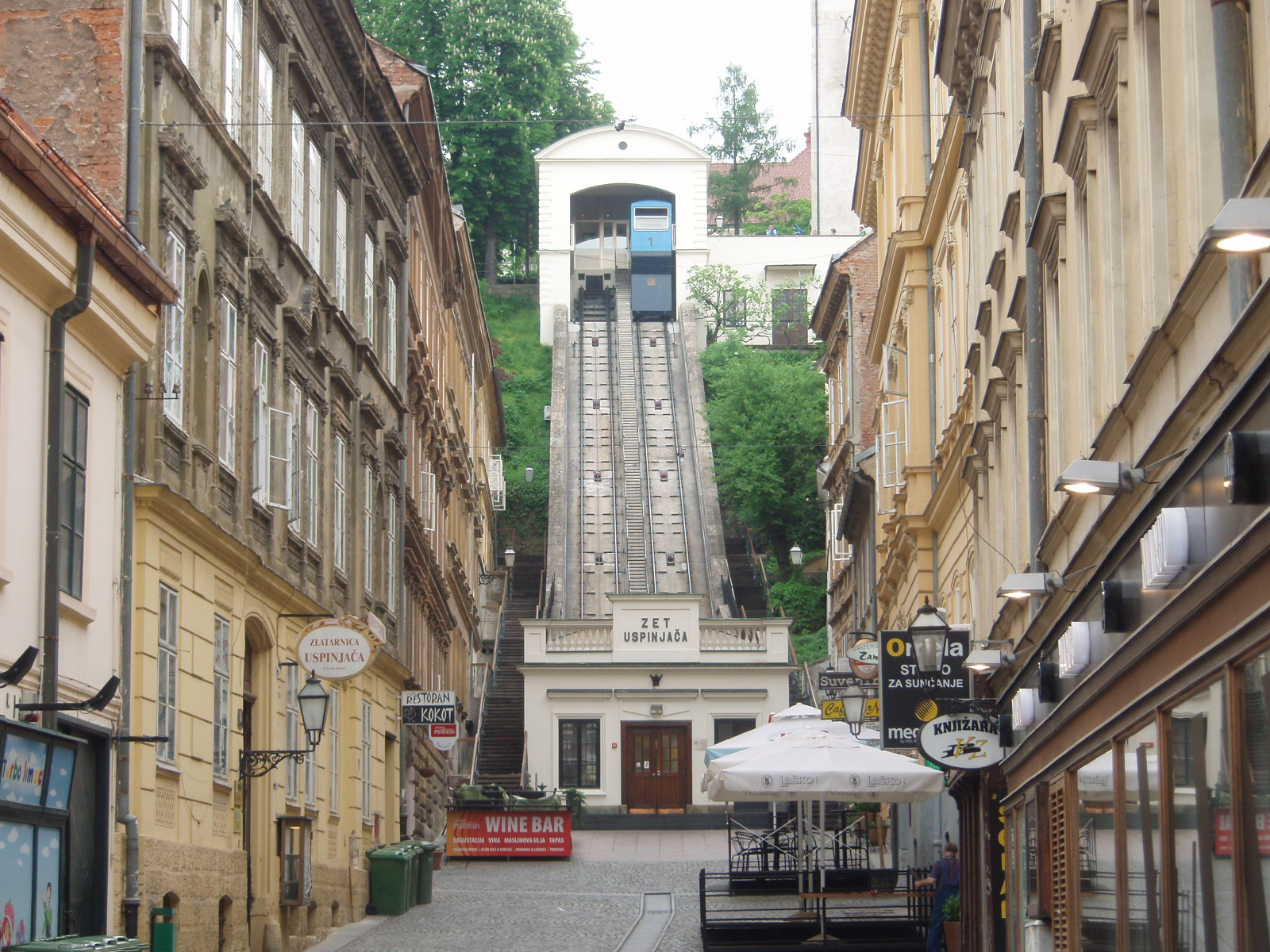 Tomićeva ul. - Uspinjača